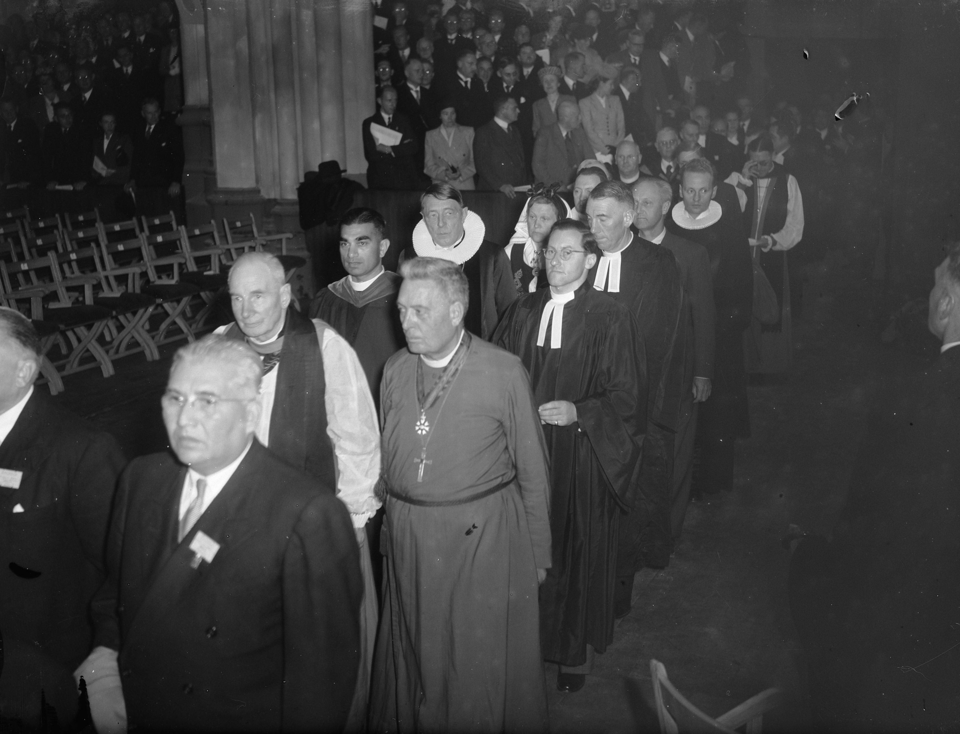 Collectie / Archief : Fotocollectie Anefo Reportage / Serie : [ onbekend ] Beschrijving : Congres Wereldraad van Kerken in de Nieuwe Kerk Datum : 22 augustus 1948 Trefwoorden : KERKEN, congressen Fotograaf : Steenkamp, […] / Anefo Auteursrechthebbende : Nationaal Archief Materiaalsoort : Glasnegatief Nummer archiefinventaris : bekijk toegang 2.24.01.09 Bestanddeelnummer : 902-9332